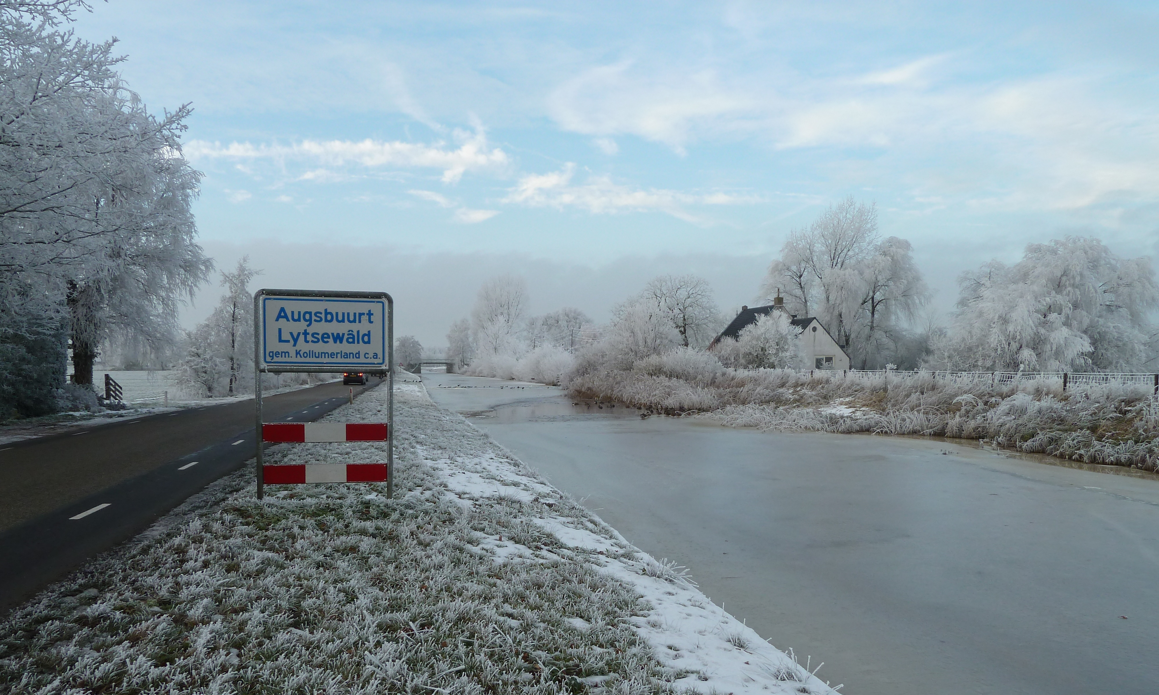 Naambordje van Augsbuurt met rechts de Stroobosservaart en de balkbrug uit 1907.